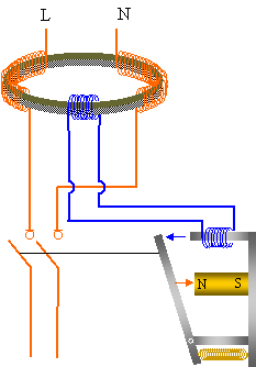 Schema zum Auslösemechanismus eines Fehlerstromschutzschalter.